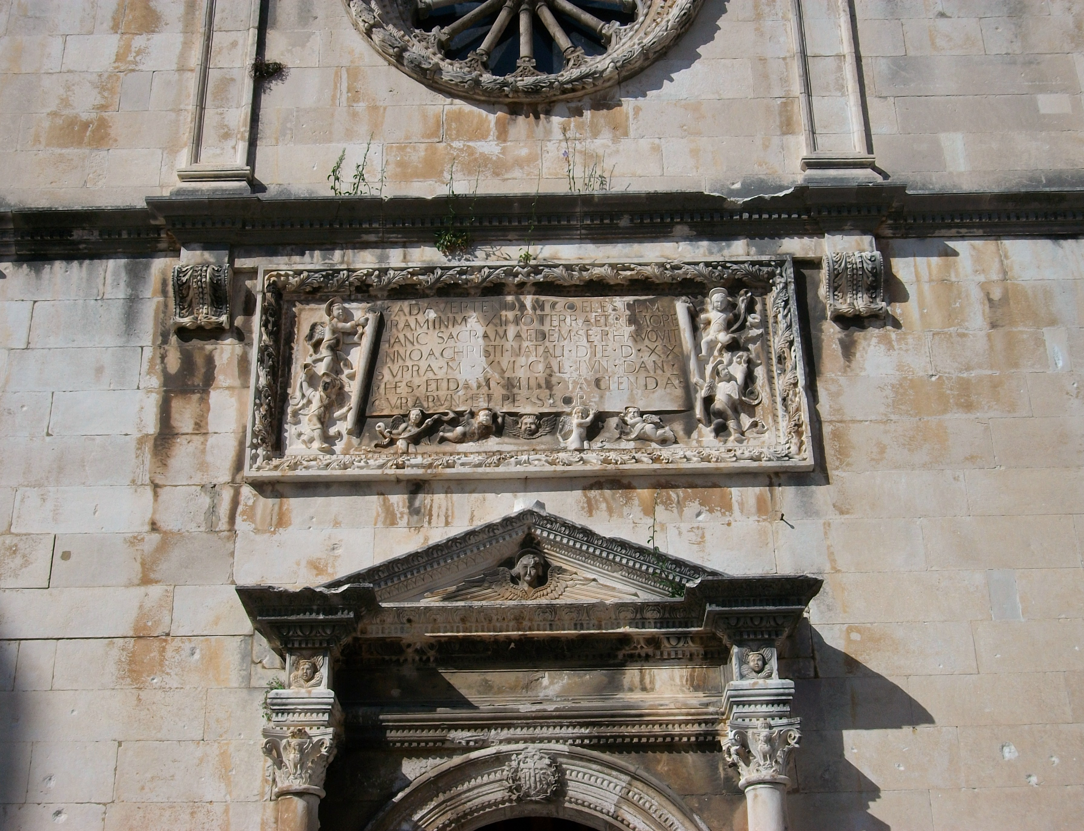 Detall de la façana de l'església del Slavador, Dubrovnik.